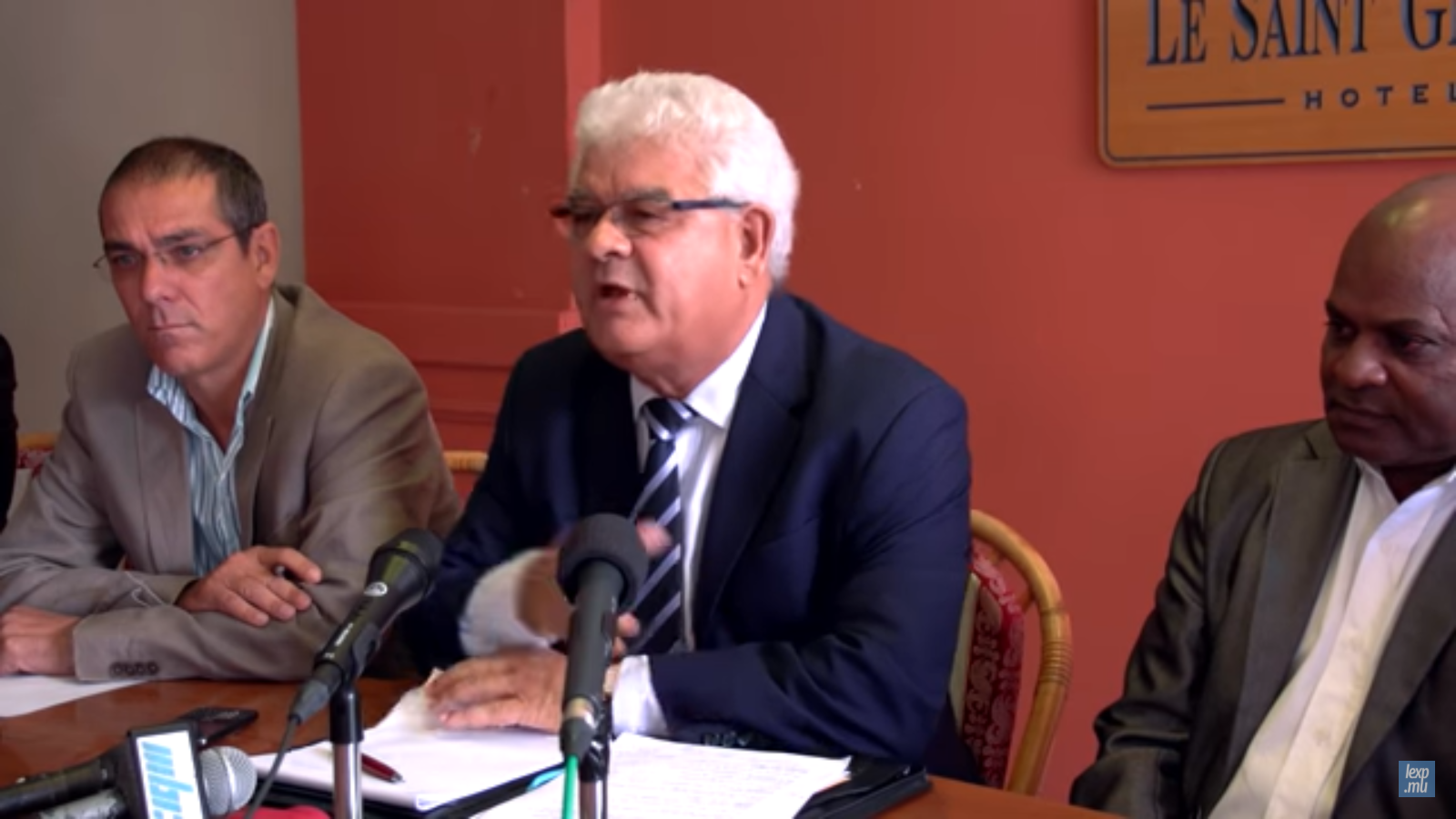 Maurice Allet, ancien Président du PMSD, durant une conférence de presse en 2014.